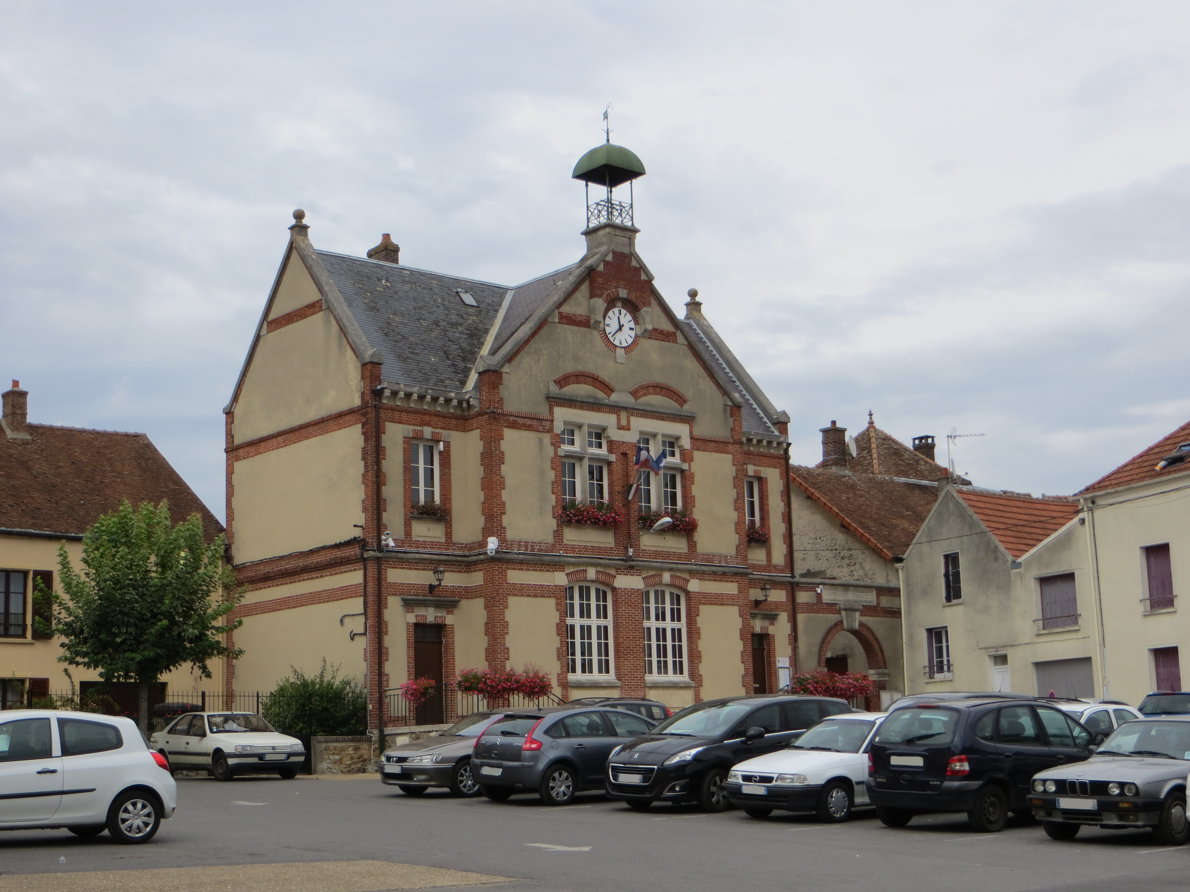 Mairie de Touquin (1887)